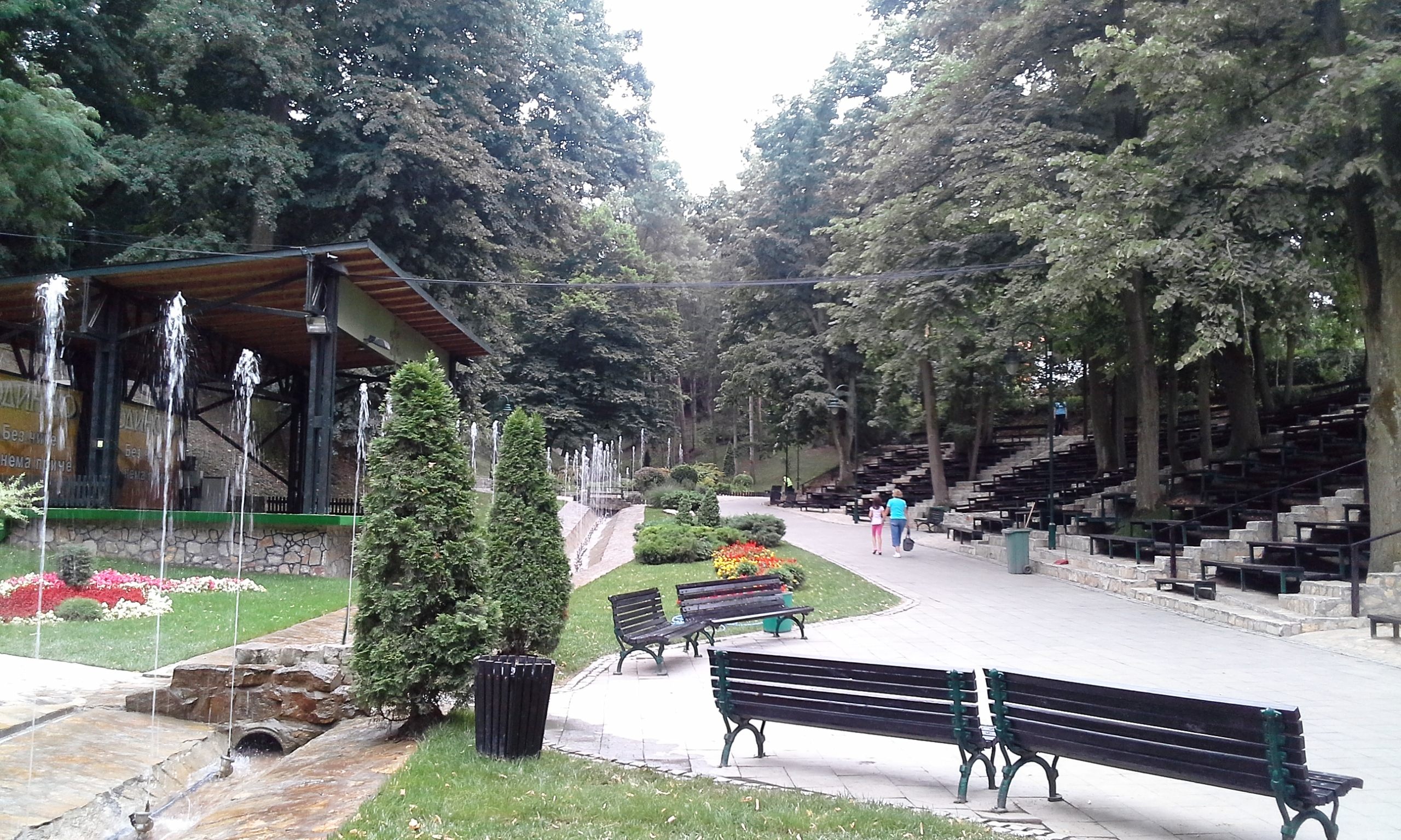 Детаљ из Арачлијског потока, градског парка у Јагодини